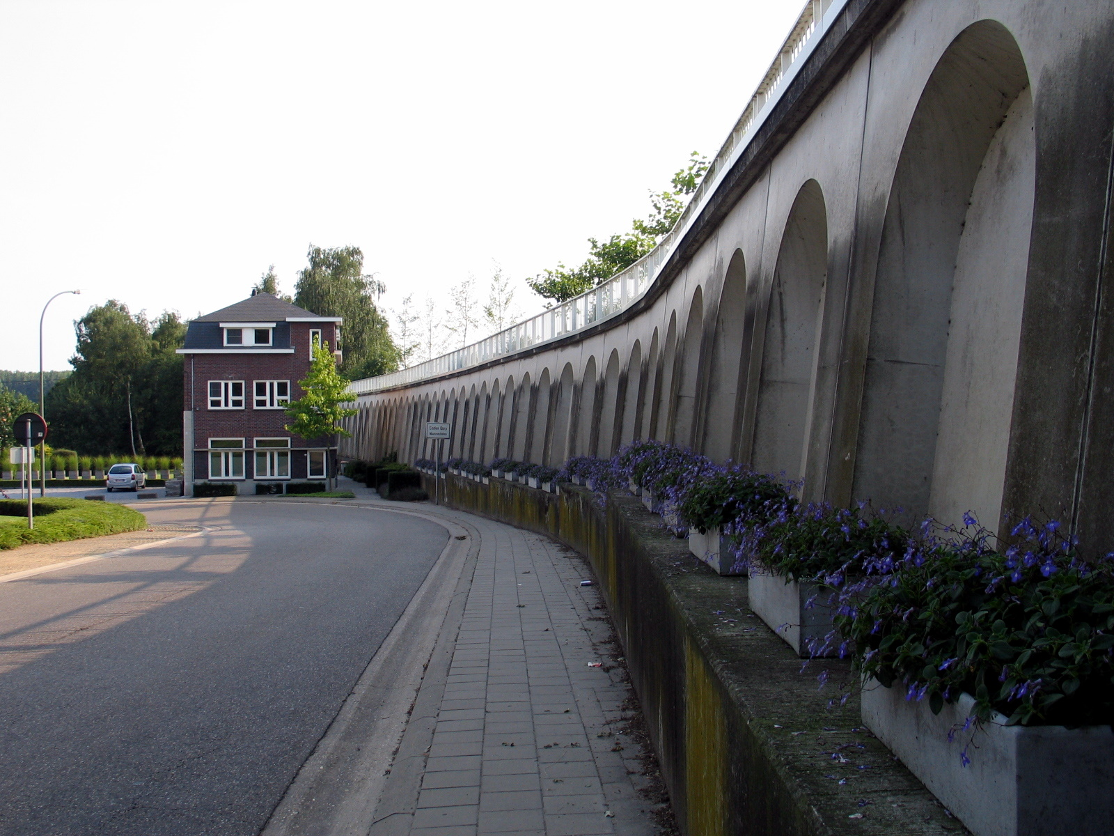 Illustratie van de grondverzakking in Eisden, België tengevolge van de steenkoolontginning. Rechts (onzichtbaar) loopt de Zuid-Willemsvaart. Het huis lag vóór de ontginning op hetzelfde niveau als de reling op de muur